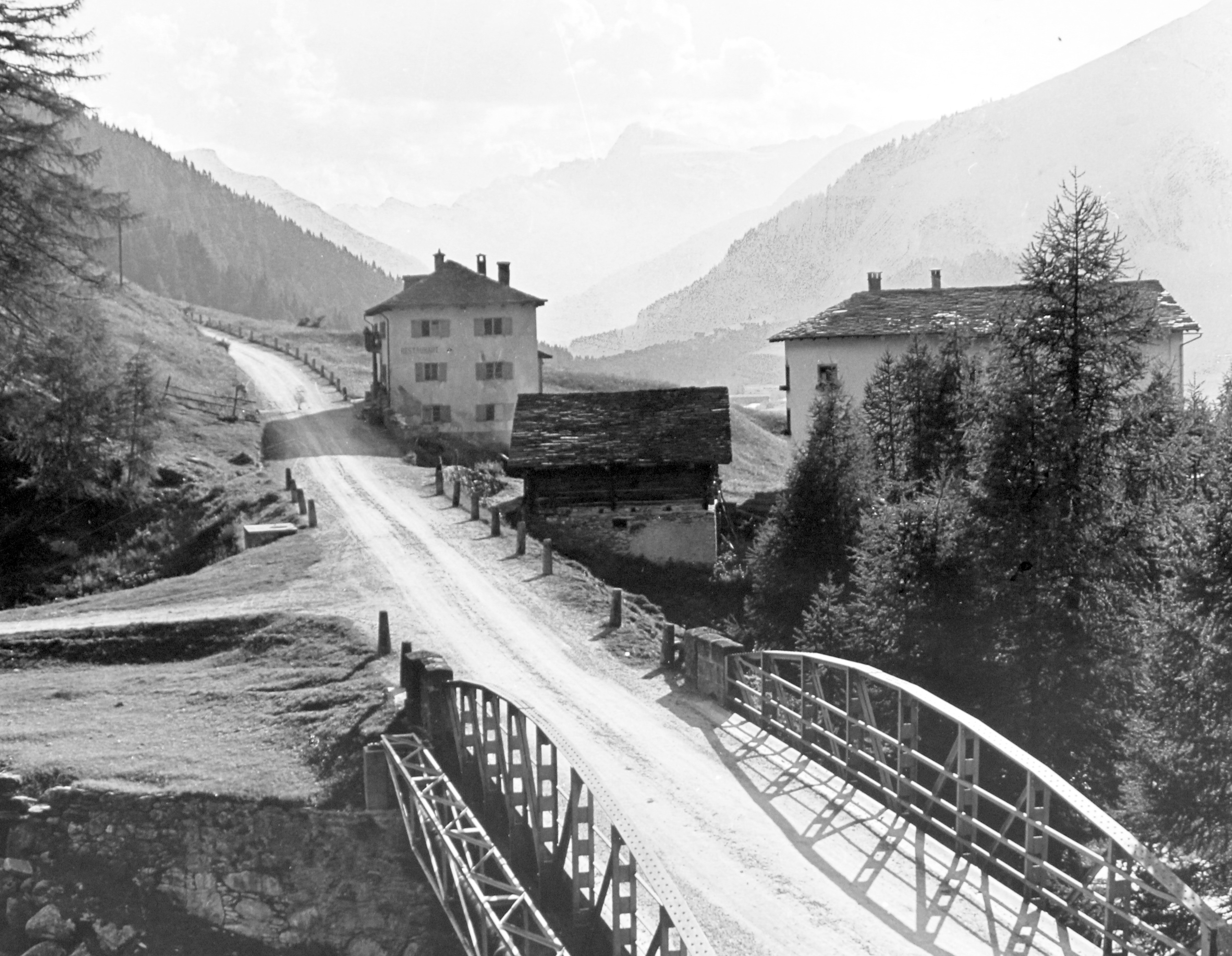 Beginn der Strasse zum Splügenpass, Blick nach Westen, um 1920